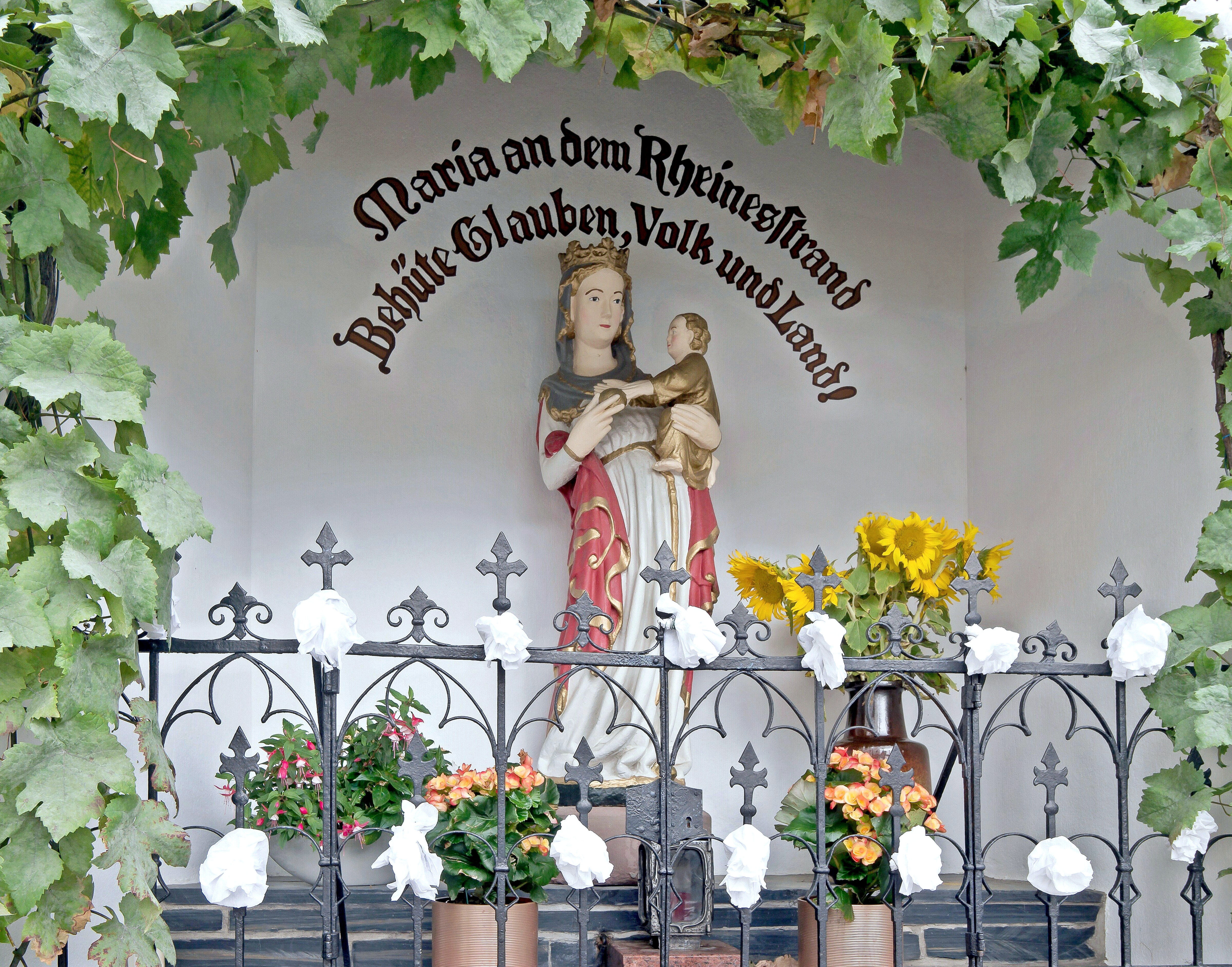 Gotische Madonna, Stein, um 1330, Schöner (weicher) Stil